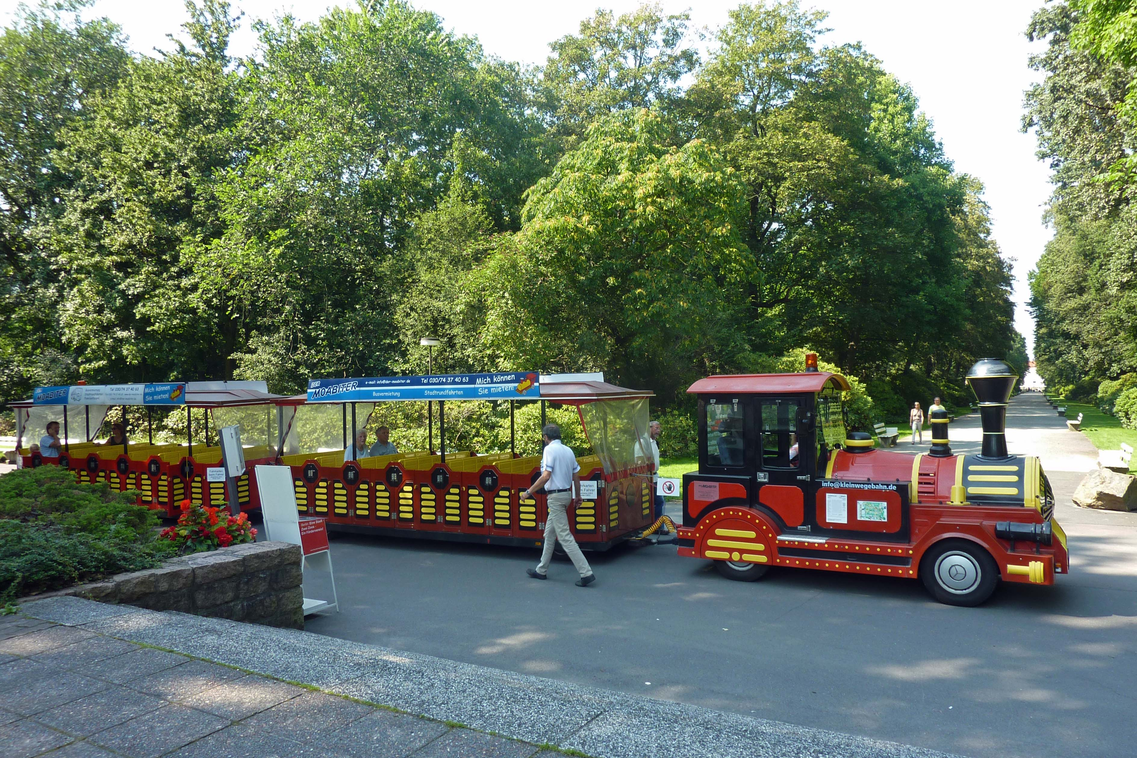 Tierpark-Bahn im Tierpark Berlin (Friedrichsfelde) am Haltepunkt Terrassencafé